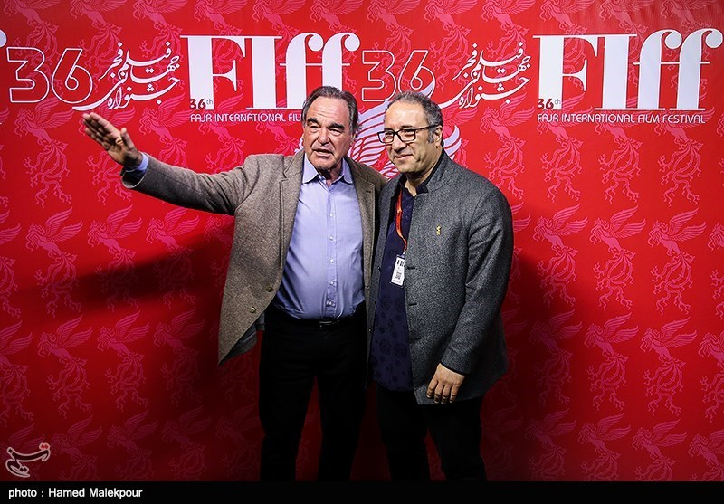 حضور الیور استون در جشنواره جهانی فیلم فجر